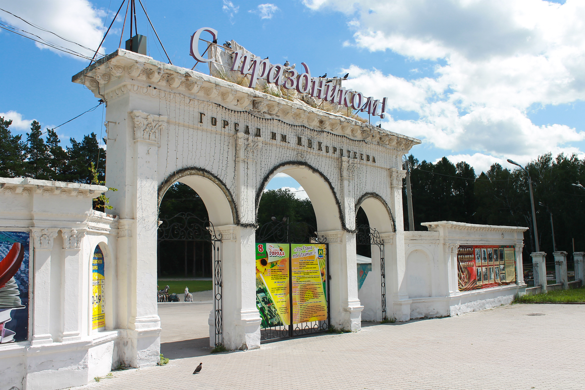 Главный вход с улицы Пушкина